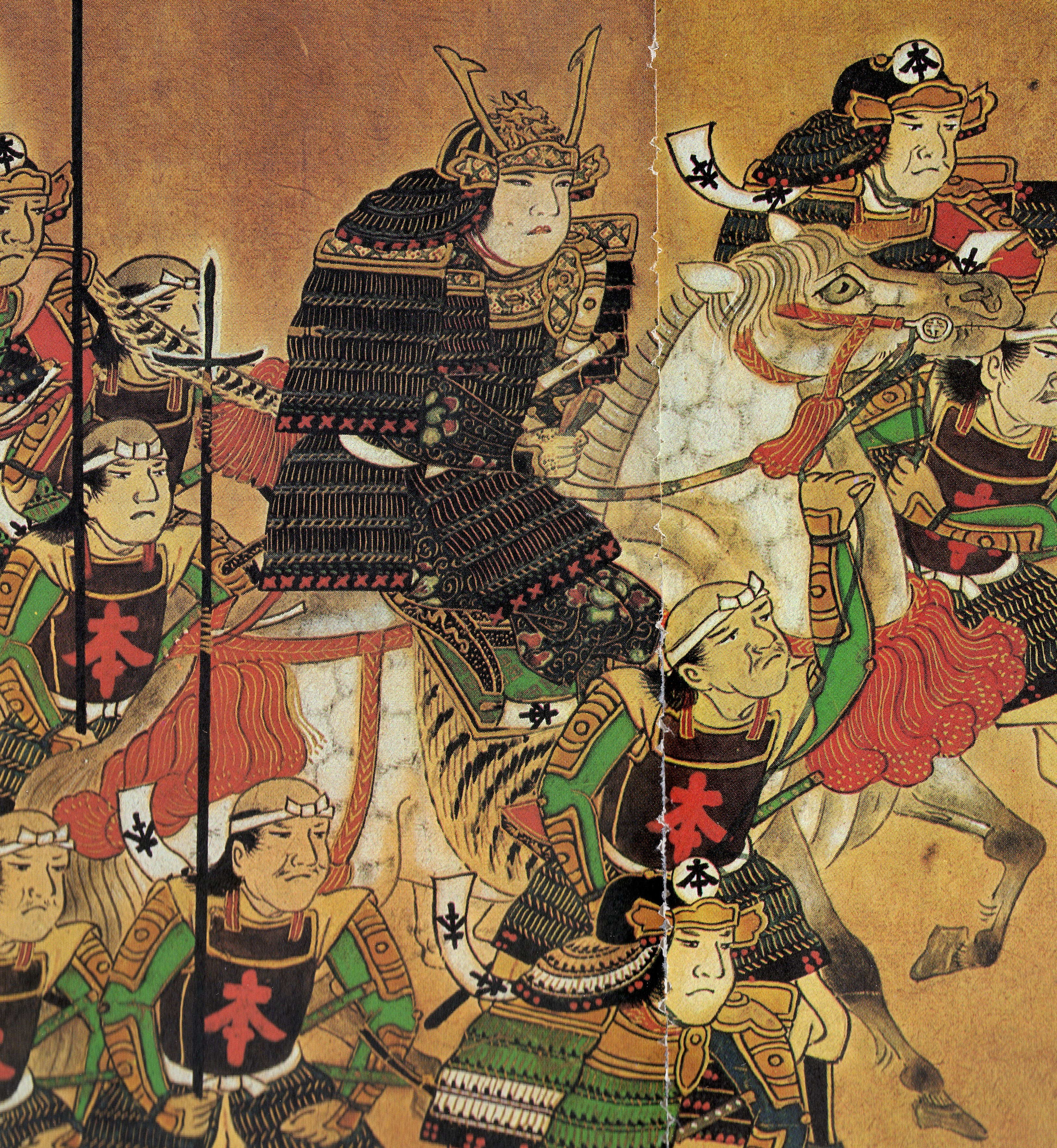 本多康慶の肖像(『陣立屏風』より)。